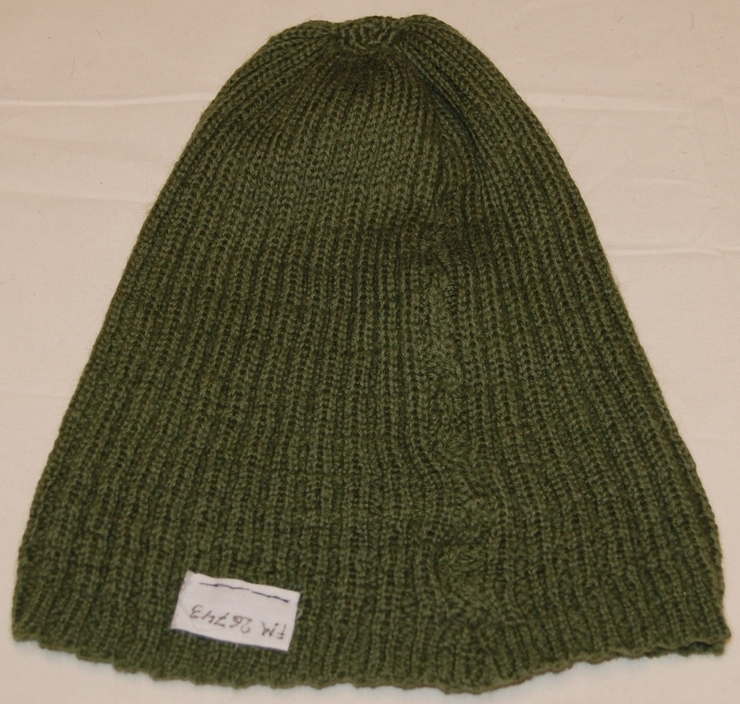 Mössmodellen "Olles brorsa".